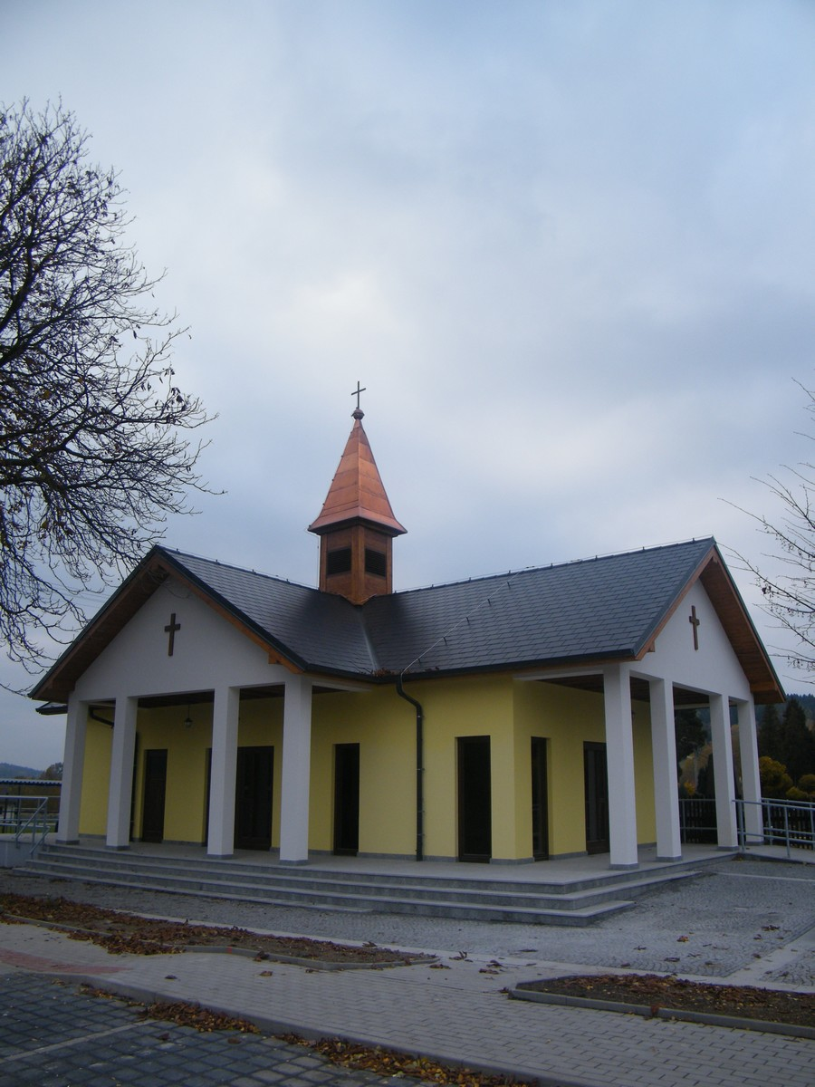 Hřbitovní kaple ve Velkém Šenově po rekonstrukci (2015)